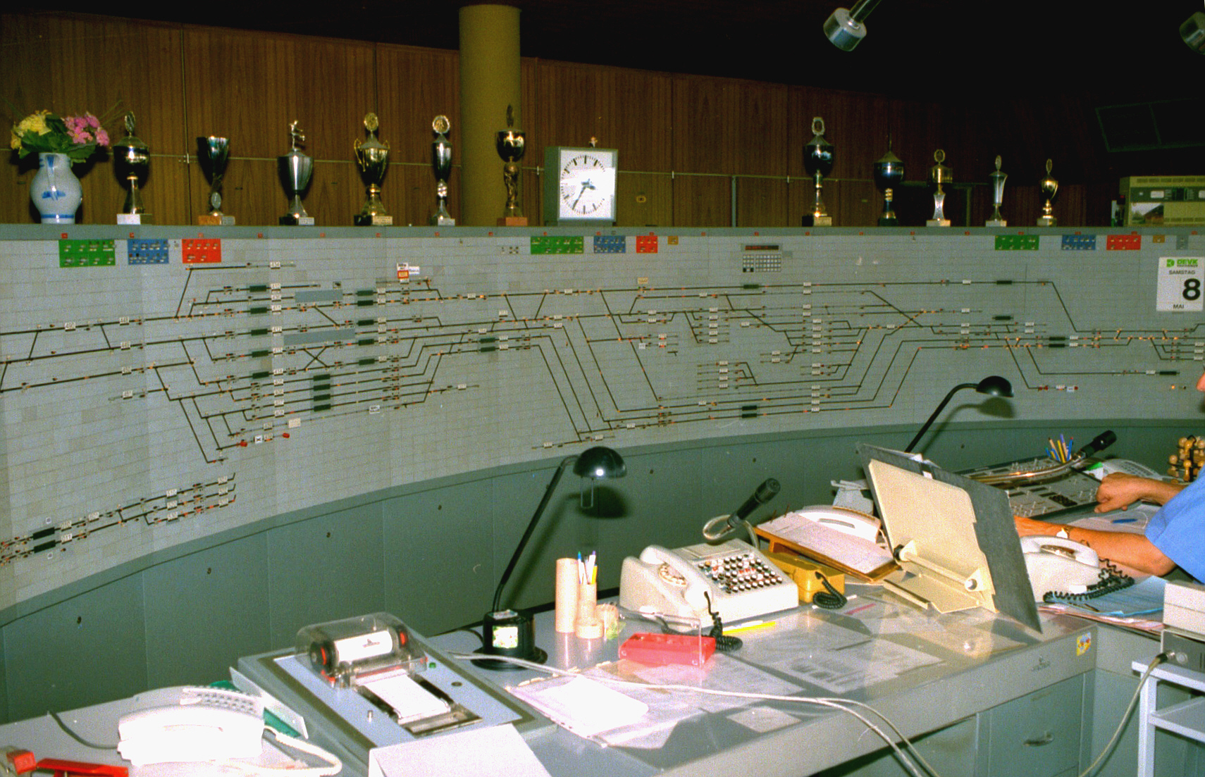 Beschreibung: Stelltafel des Sp Dr S 60-Stellwerkes mit Nummernstellpult im Bahnhof Trier Hbf, Quelle: eigene Aufnahme, Fotograf: F. Hein